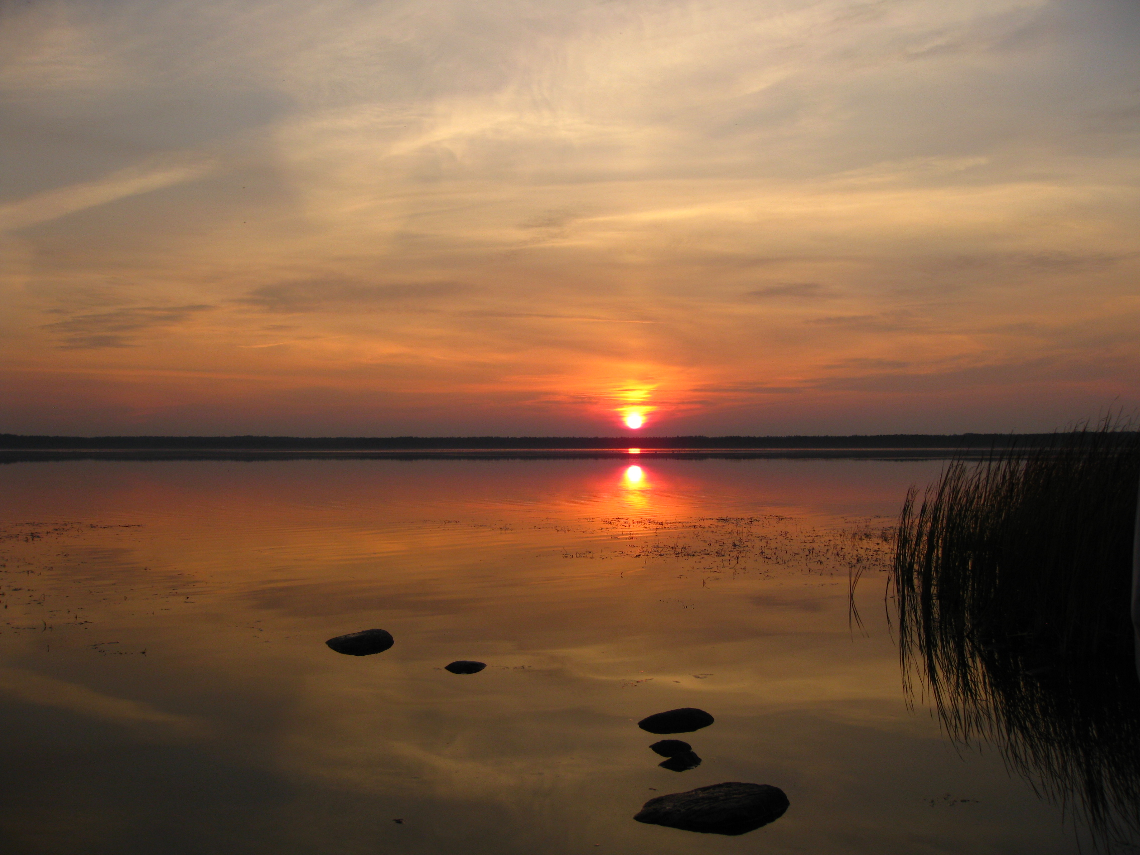 Kahala järve kirdekaldal, Lahemaa RP